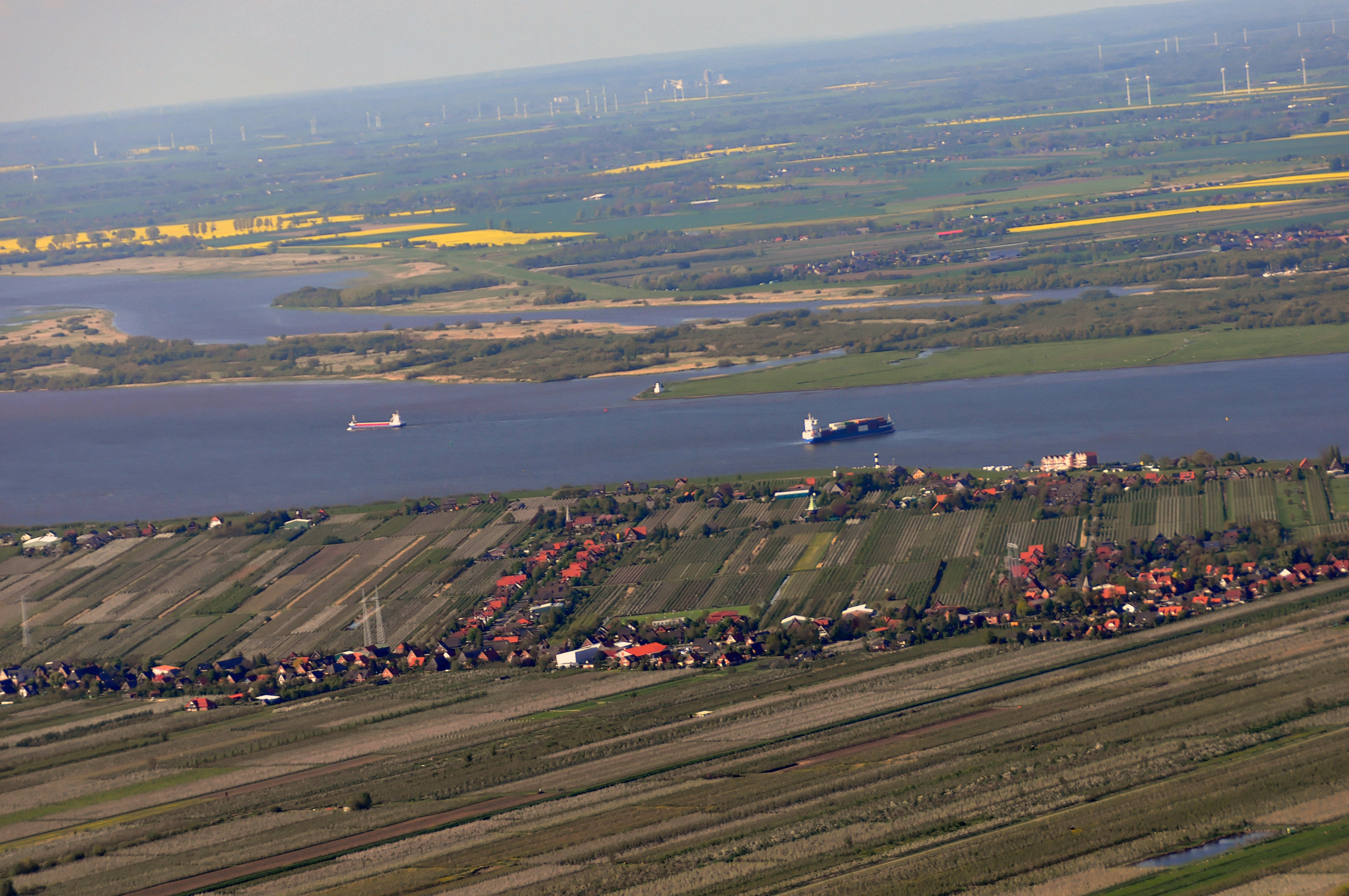 Luftbilder von der Nordseeküste 2012-05